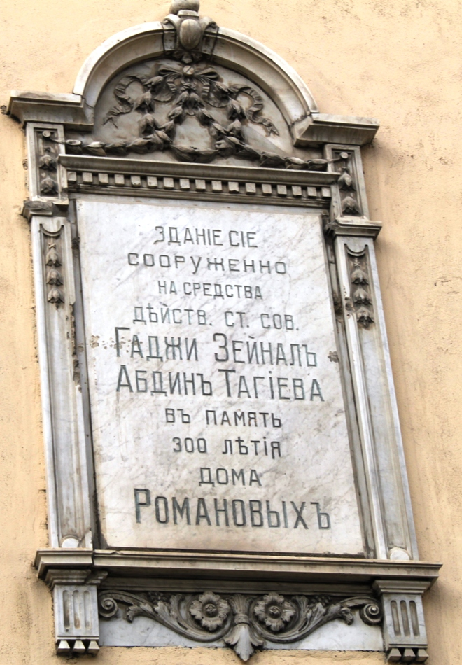 Здание построенное в Баку на средства Гаджи Зейнал Абдин Тагиева